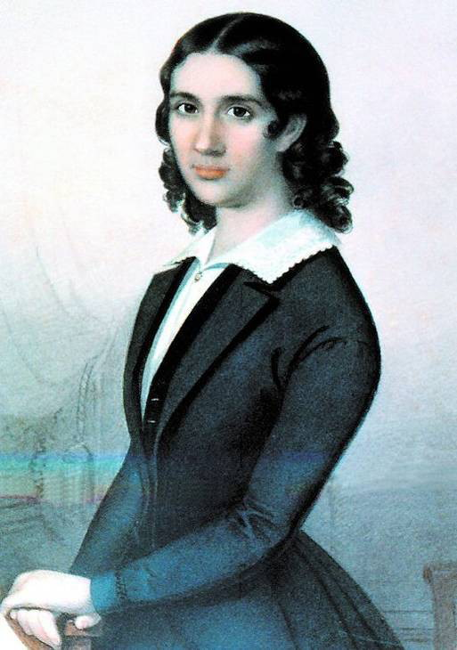 Wendela Hebbe